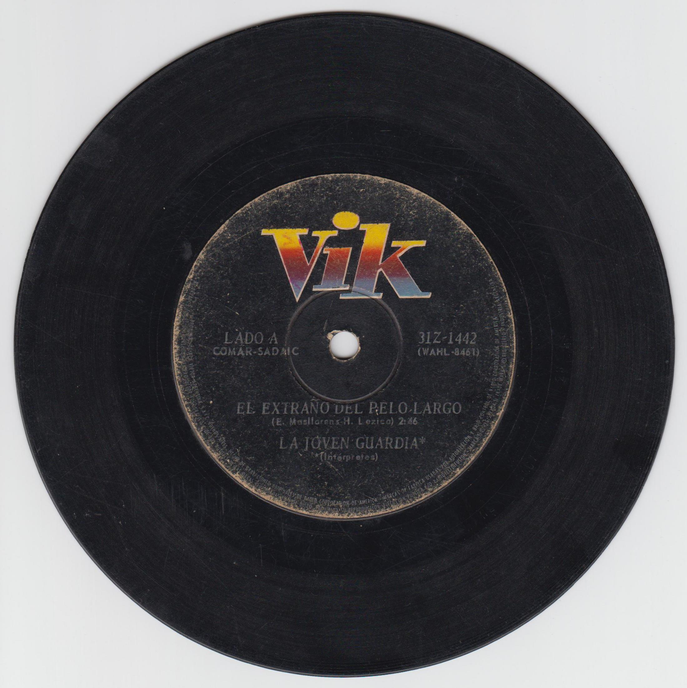 Disco de vinilo simple de La joven guardia, con los temas "El extraño de pelo largo" y "Motores de pastel".